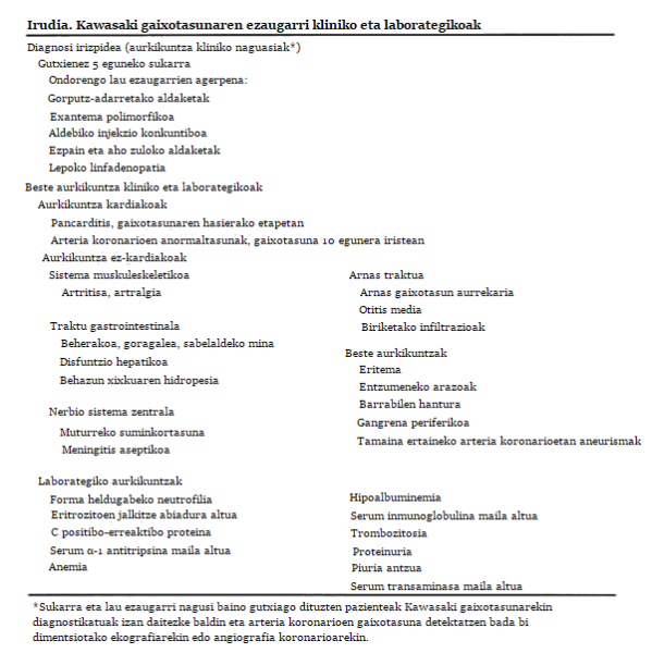 KG-ren diagnostikoaren oinarrizko irizpideak eta gaixotasun honek gorputzeko sistema desberdinetan azaleratzen dituen sintomak